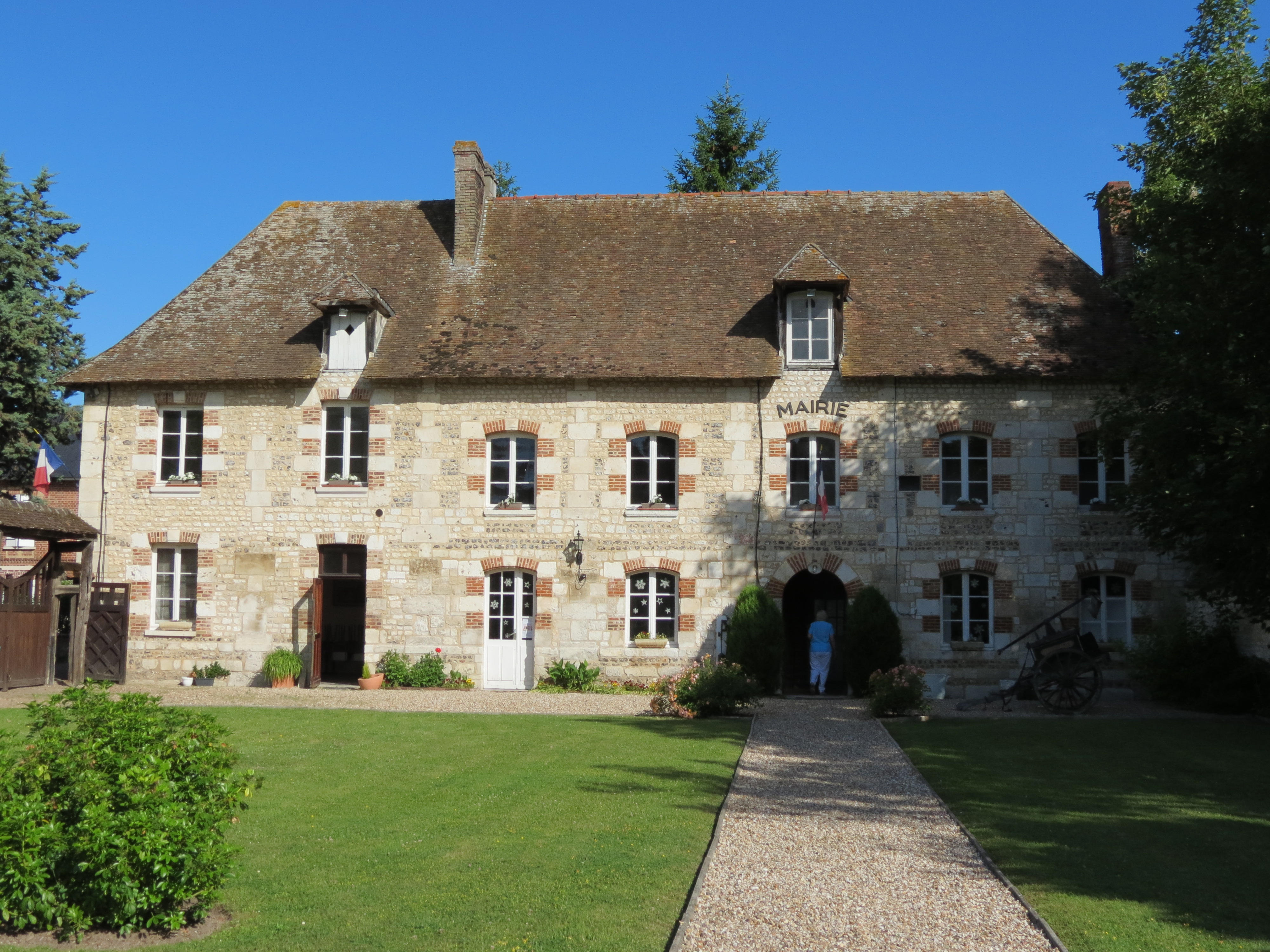 Mairie de Porte-Joie.